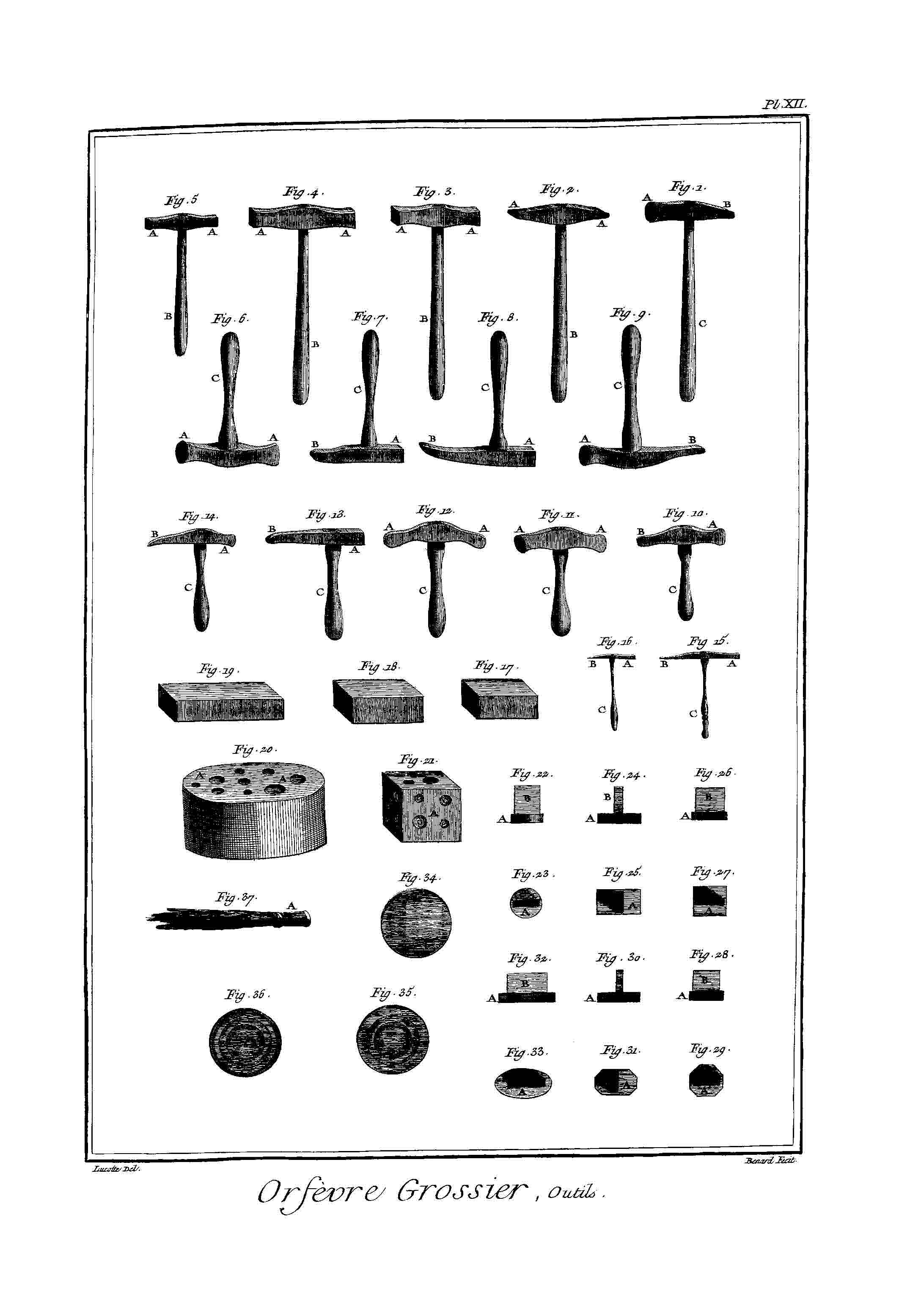 orfèvre 12: orfèvre grossier, outils